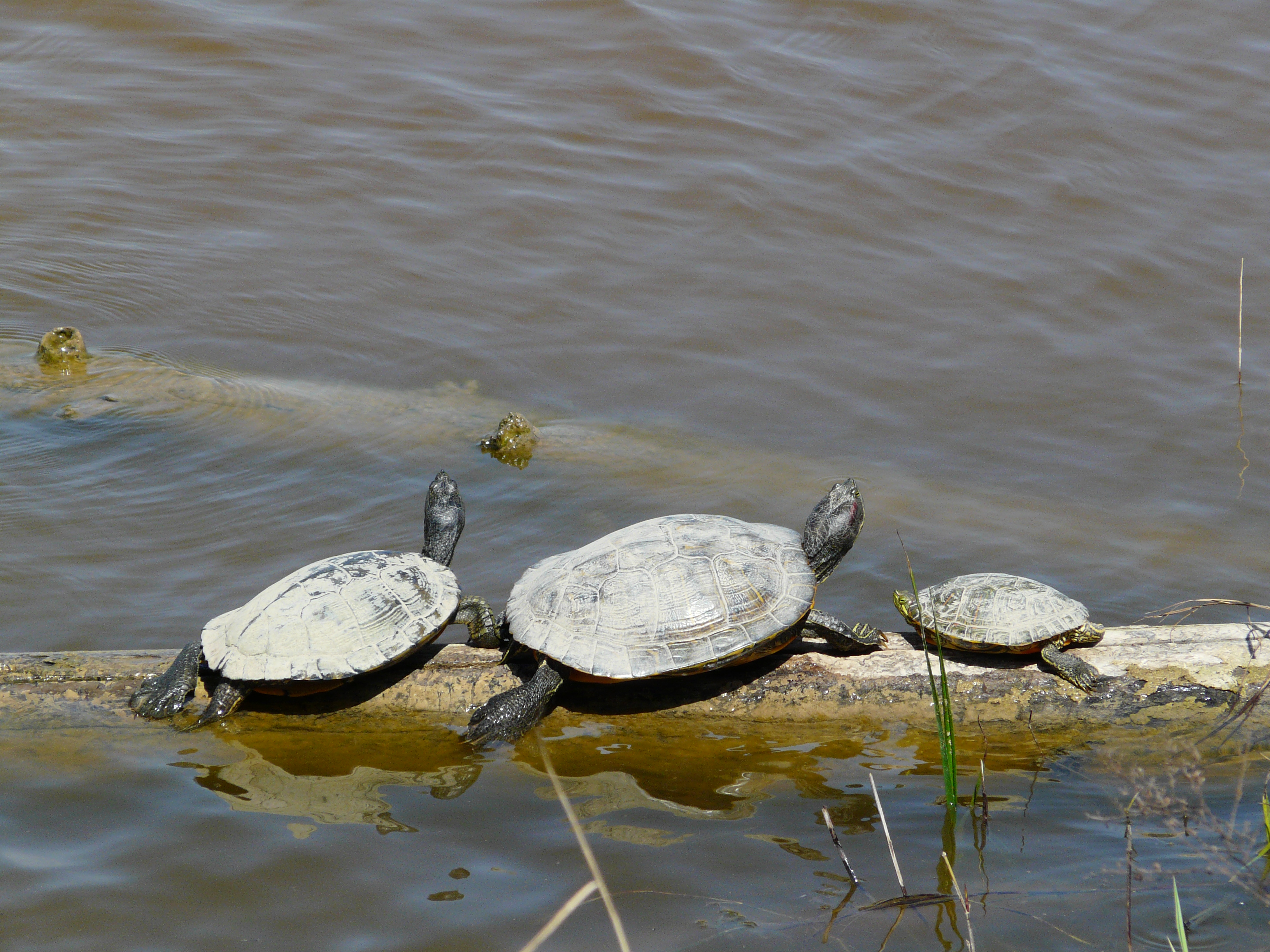 Tortugues de Florida